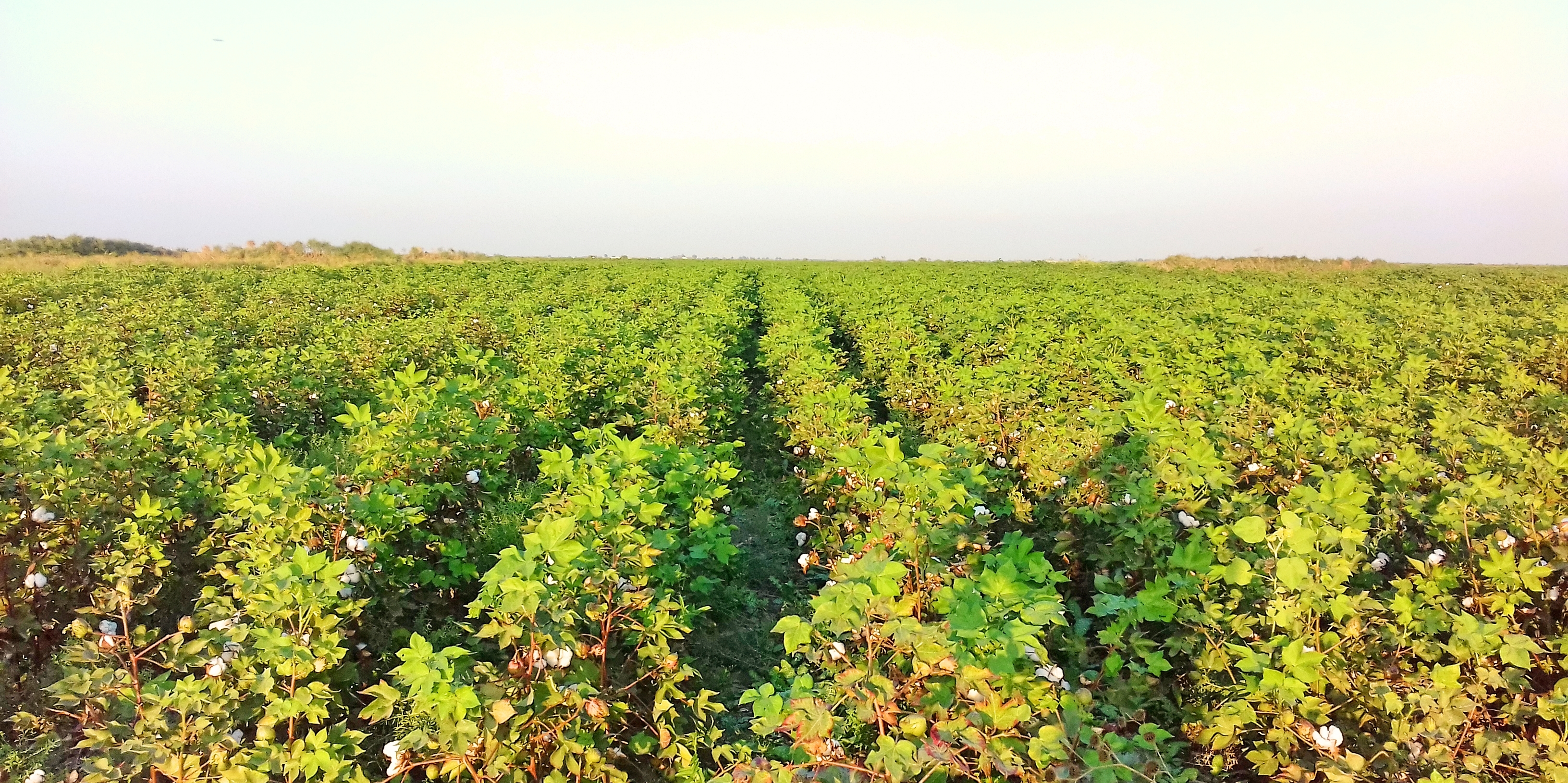 Pambıq əkinləri